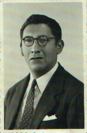 CARLOS MALDONADO RAMIREZ POETA AREQUIPEÑO